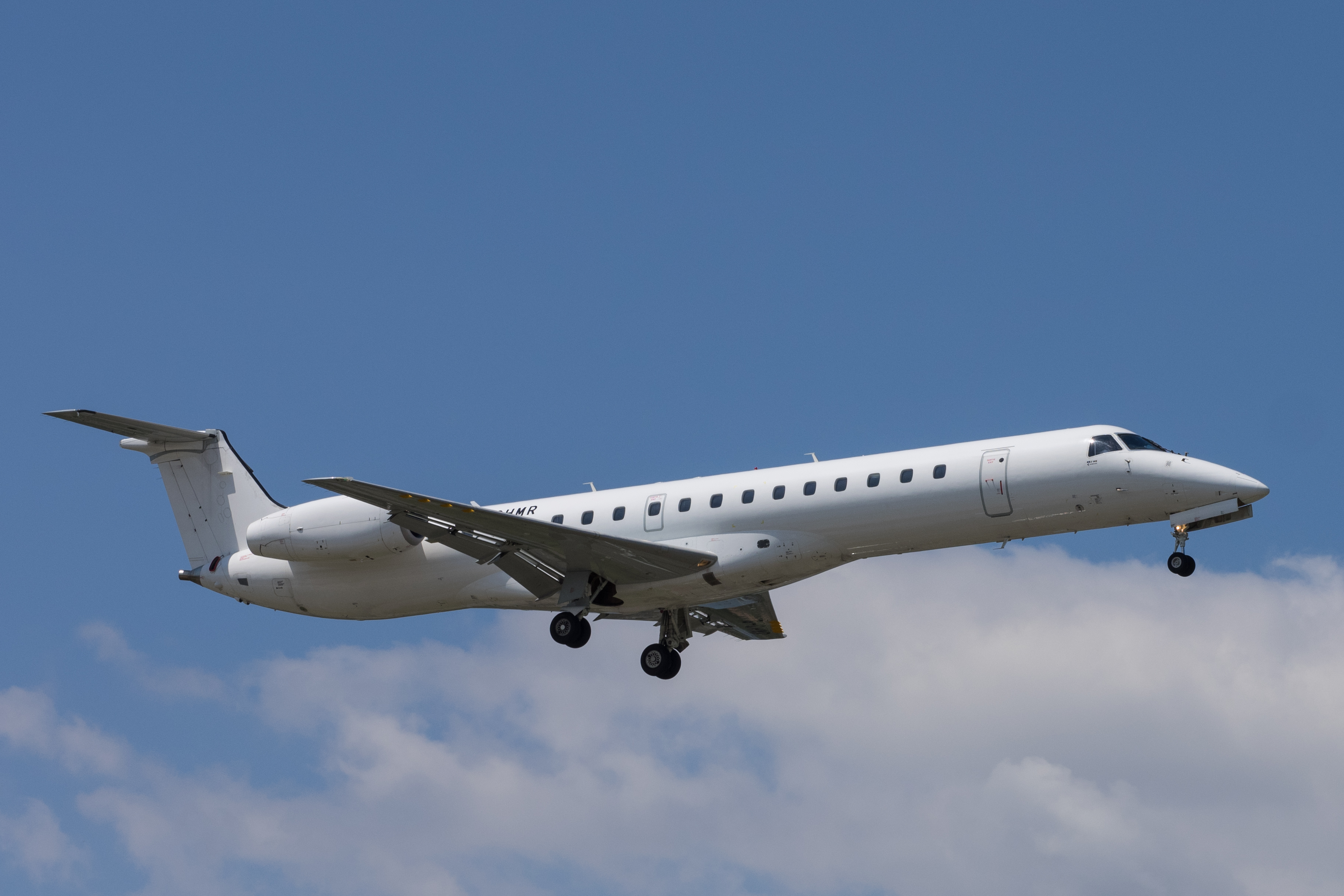 GVA 22.05.2015